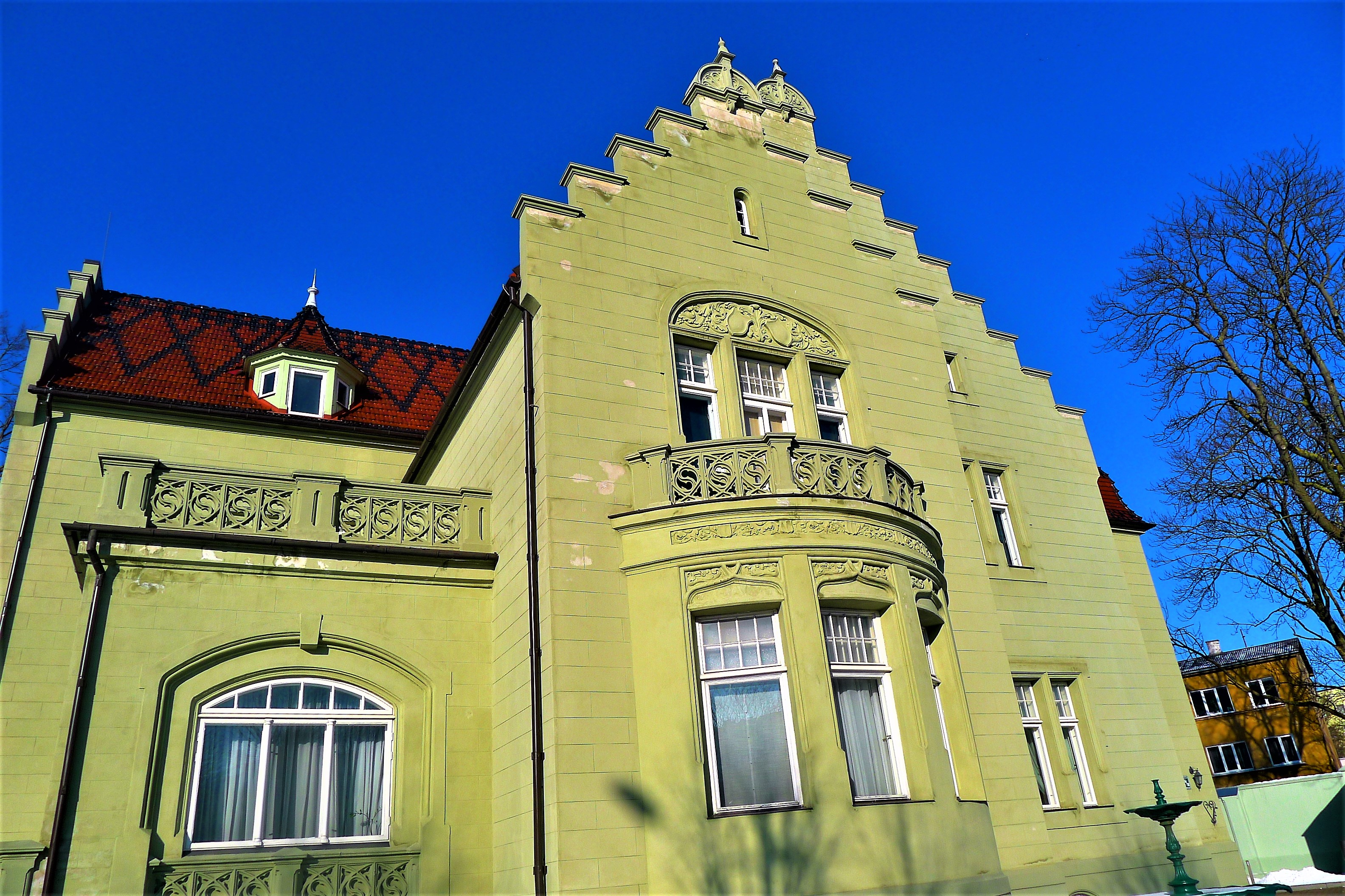 Savrupmāja, tagad Liepājas muzejs, Liepāja, Kūrmājas prospekts 16